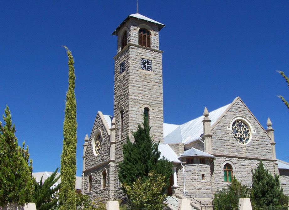 Die NG moederkerk op Springbok